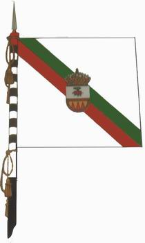 Bandera de Rábano, en Valladolid (España)